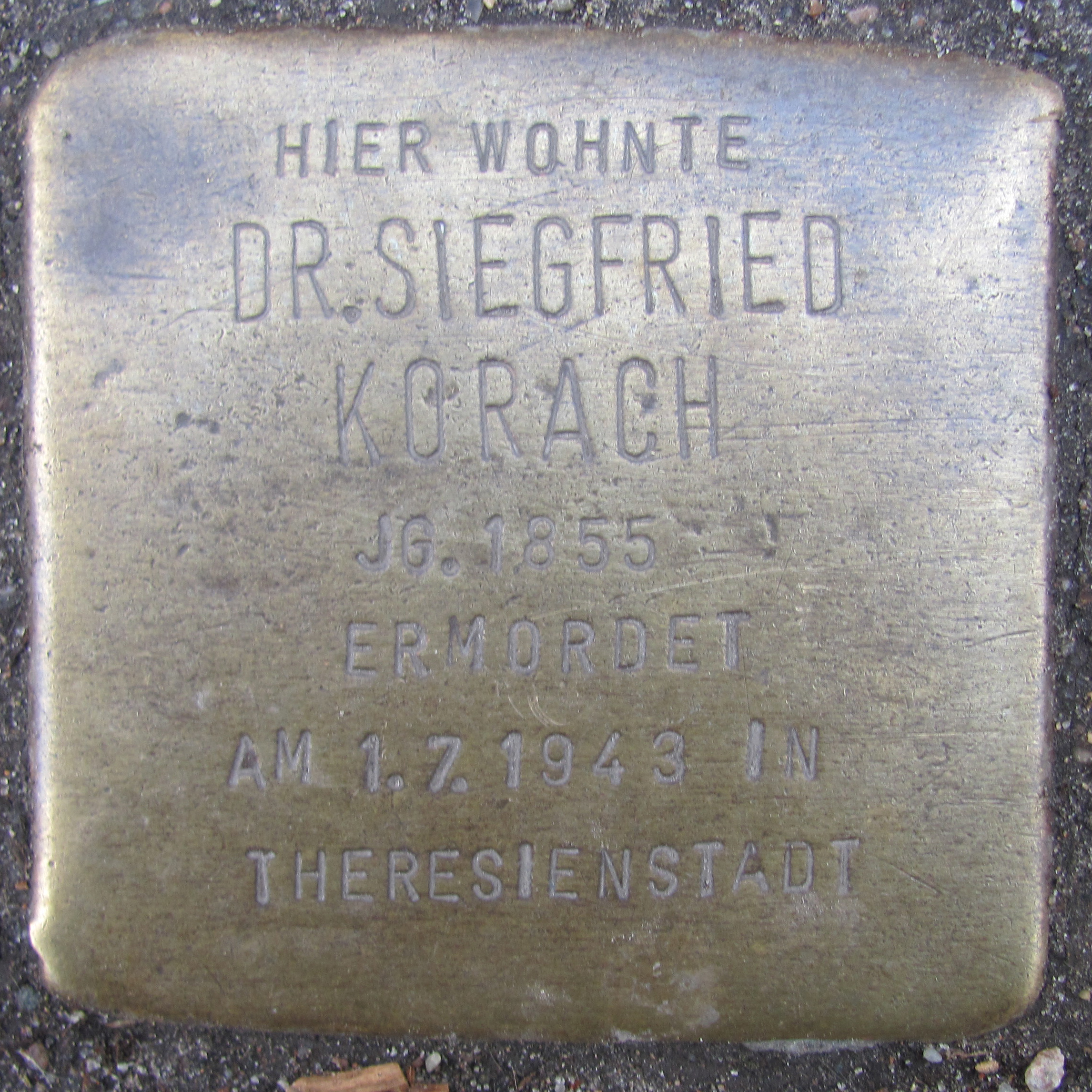 Stolperstein für Siegfried Korach (Lebenslauf bei vor dem Haus Hartungstraße 1